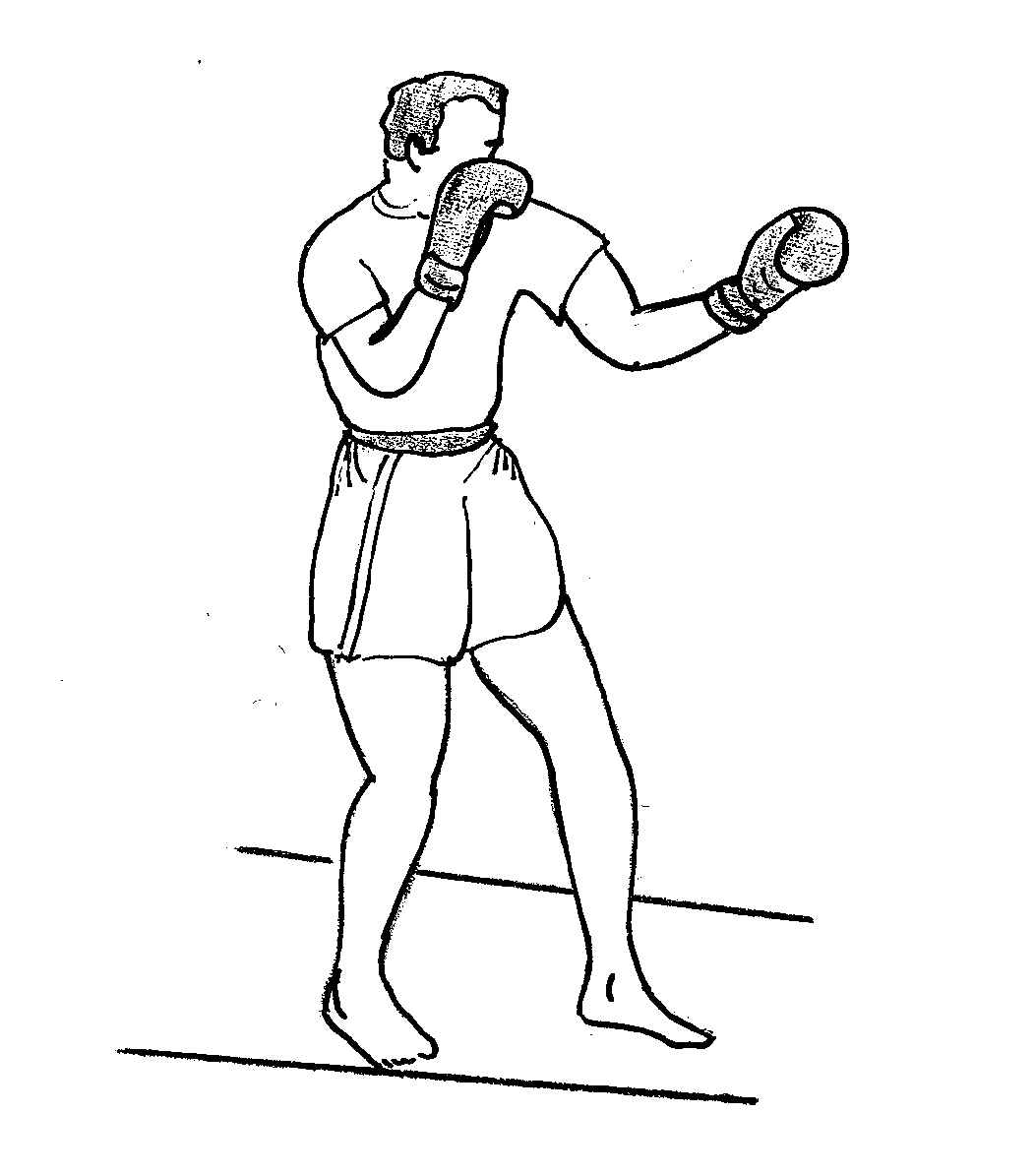 garde_avancée1.jpg